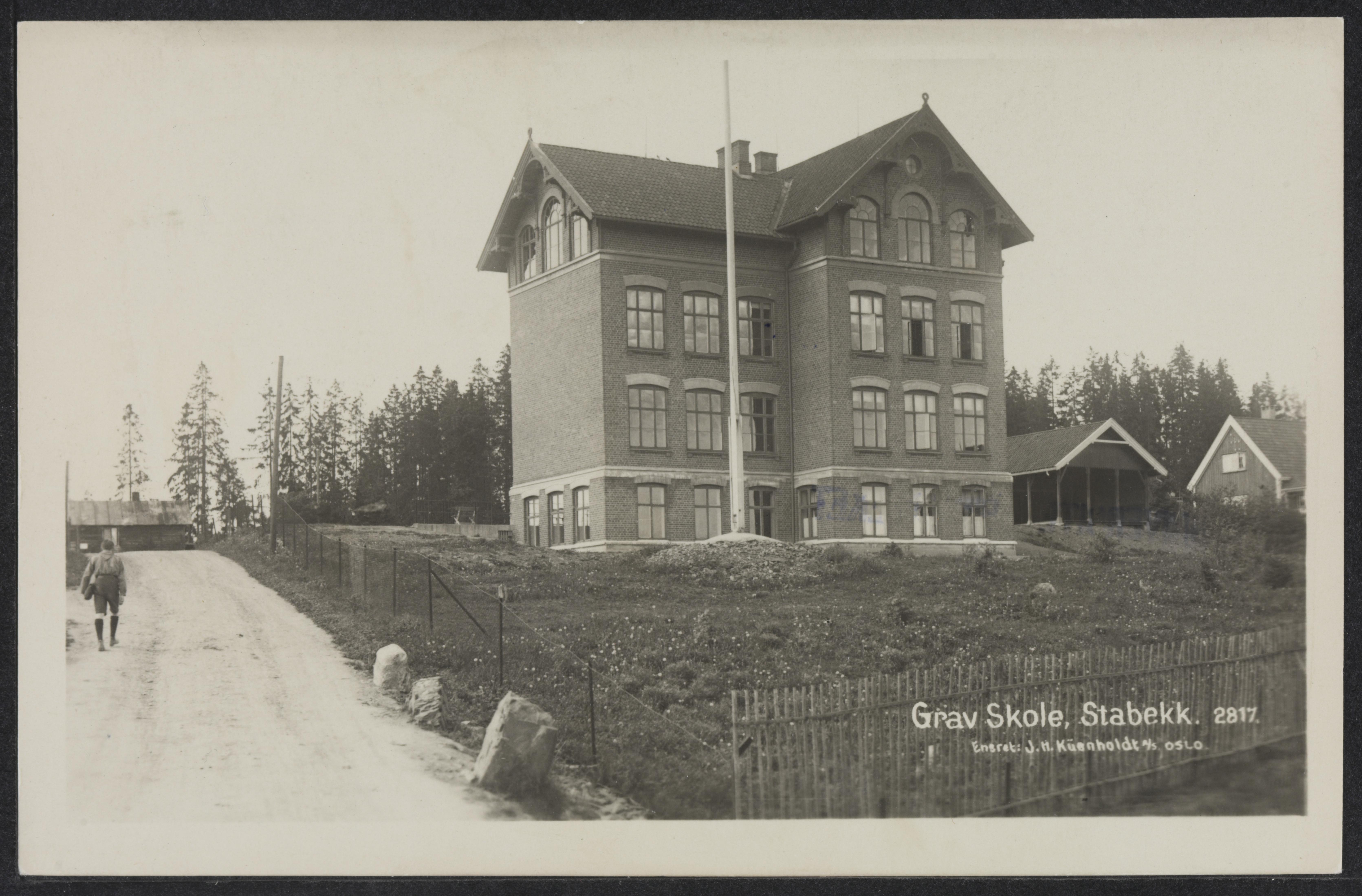 Bildet er hentet fra Nasjonalbibliotekets bildesamling Grav,Grav skole,Stabekk, Bærum, Akershus